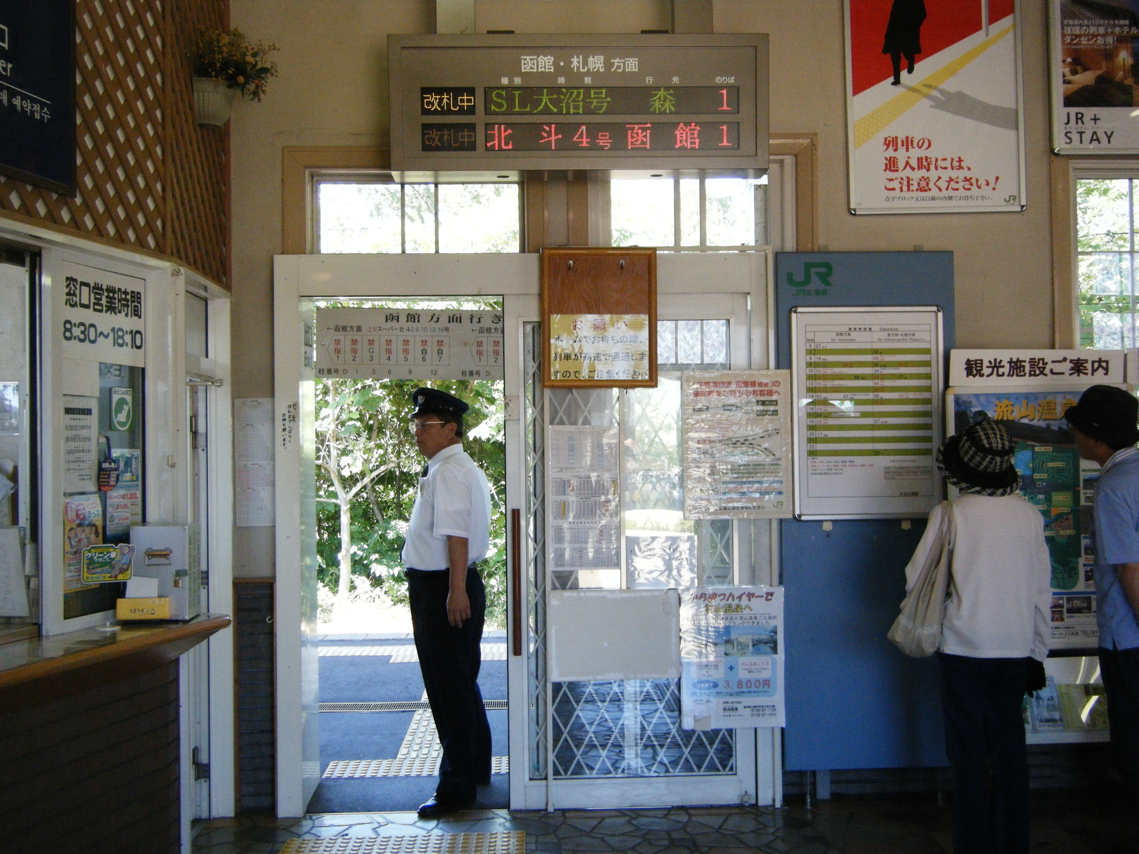 大沼公園駅改札